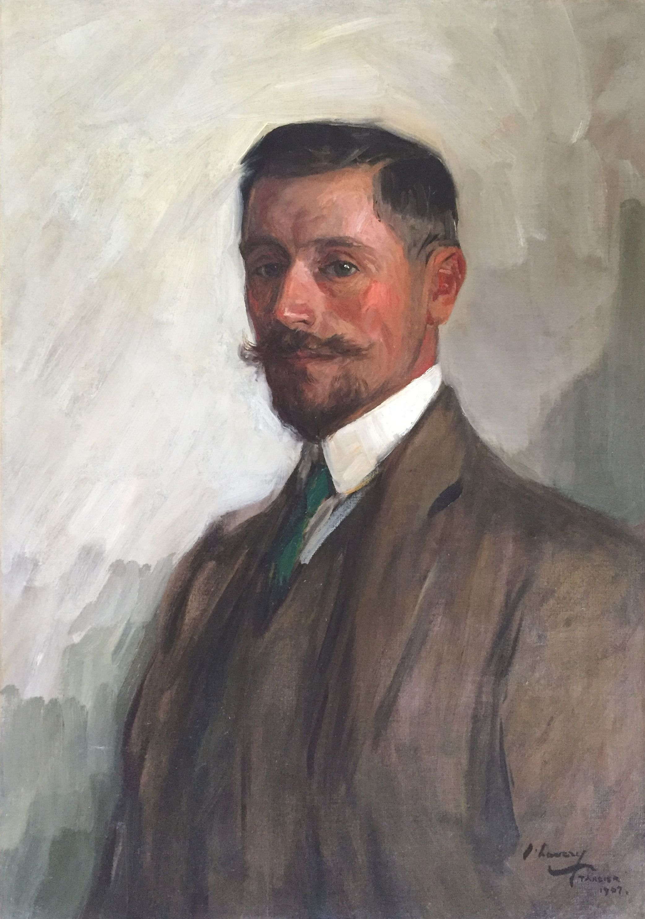 Portrait von Walter Burton Harris (1866-1933), Gemälde (Öl auf Leinwand) von Sir John Lavery (1856-1941), signiert und datiert 1907